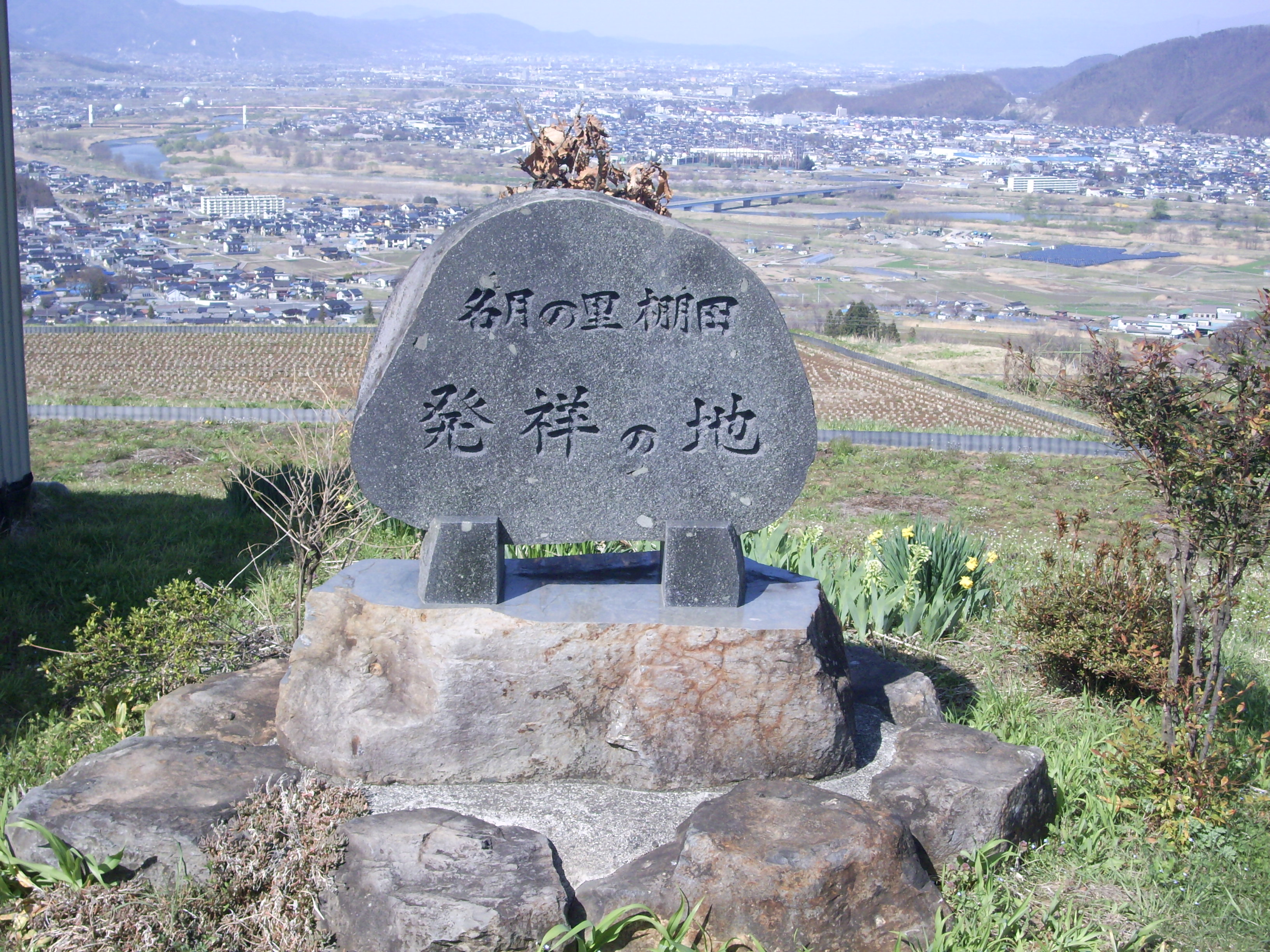 重要文化的景観「姨捨の棚田」ー石碑